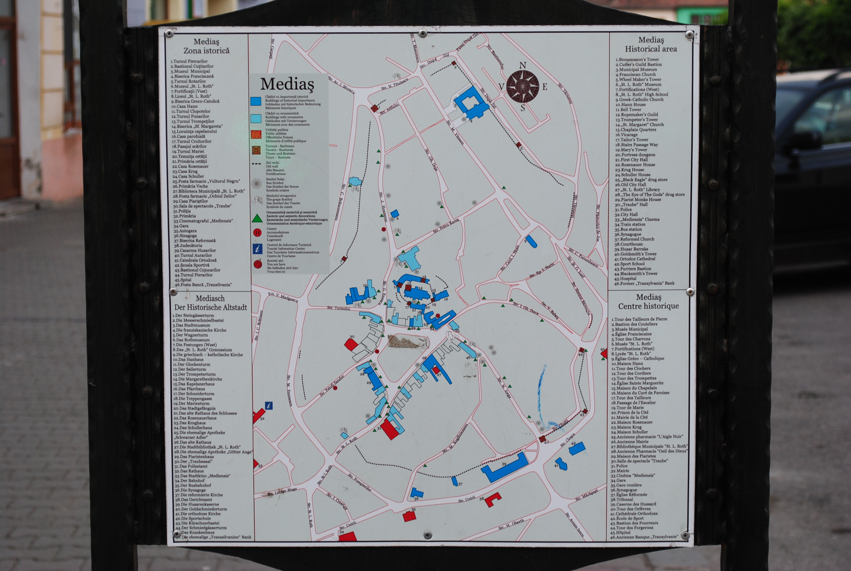 Ansamblul urban "Centrul istoric al municipiului"